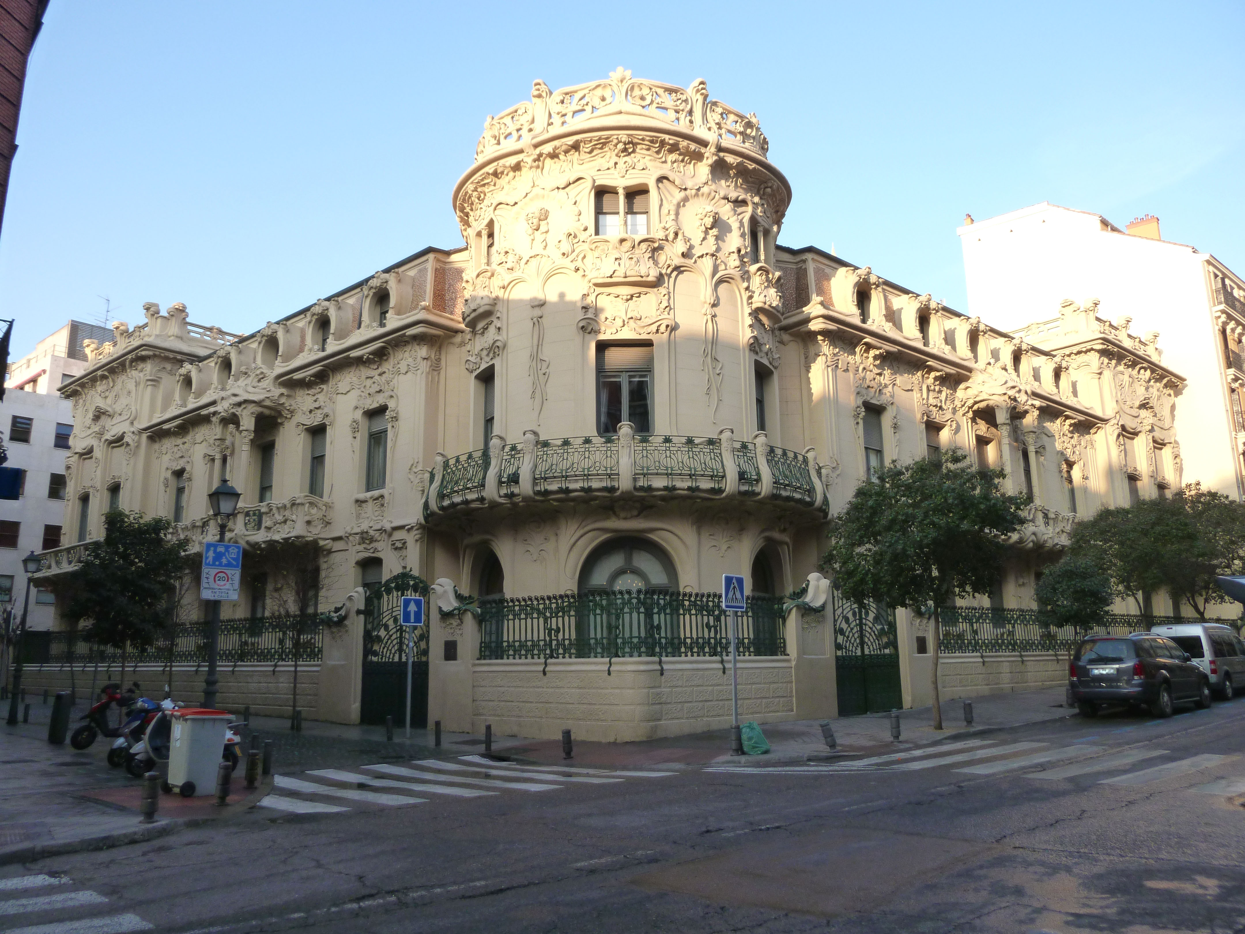 Facade of Palacio Longoria in Madrid (Spain).